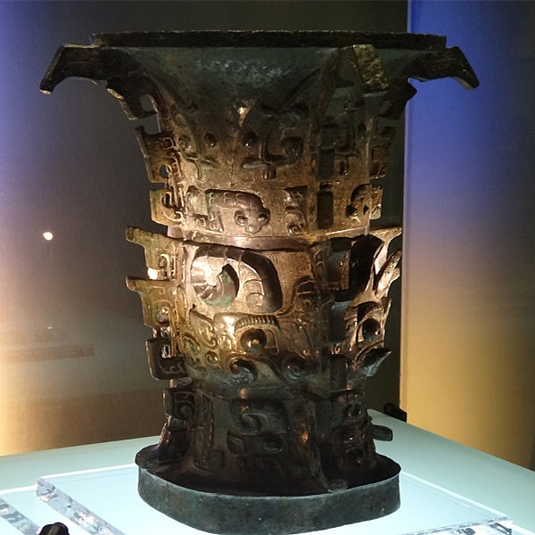 何尊，西周早期，高38.8cm，口径28.8cm，重14.5kg。1963年宝鸡县贾村镇出土。现藏于宝鸡青铜器博物院。是“中国”一词已知的最早出处。